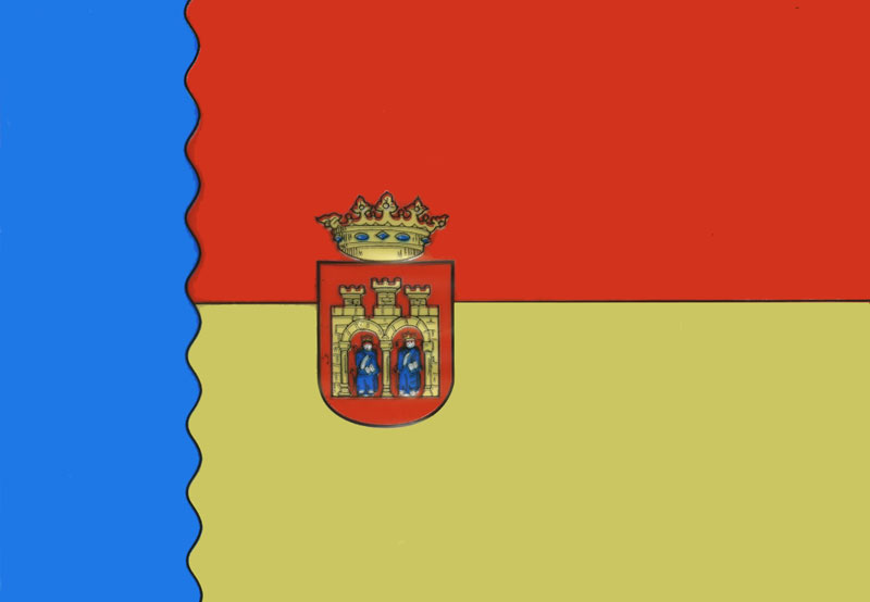 Bandera del municipio de Villarcayo de Merindad de Castilla la Vieja (Burgos).